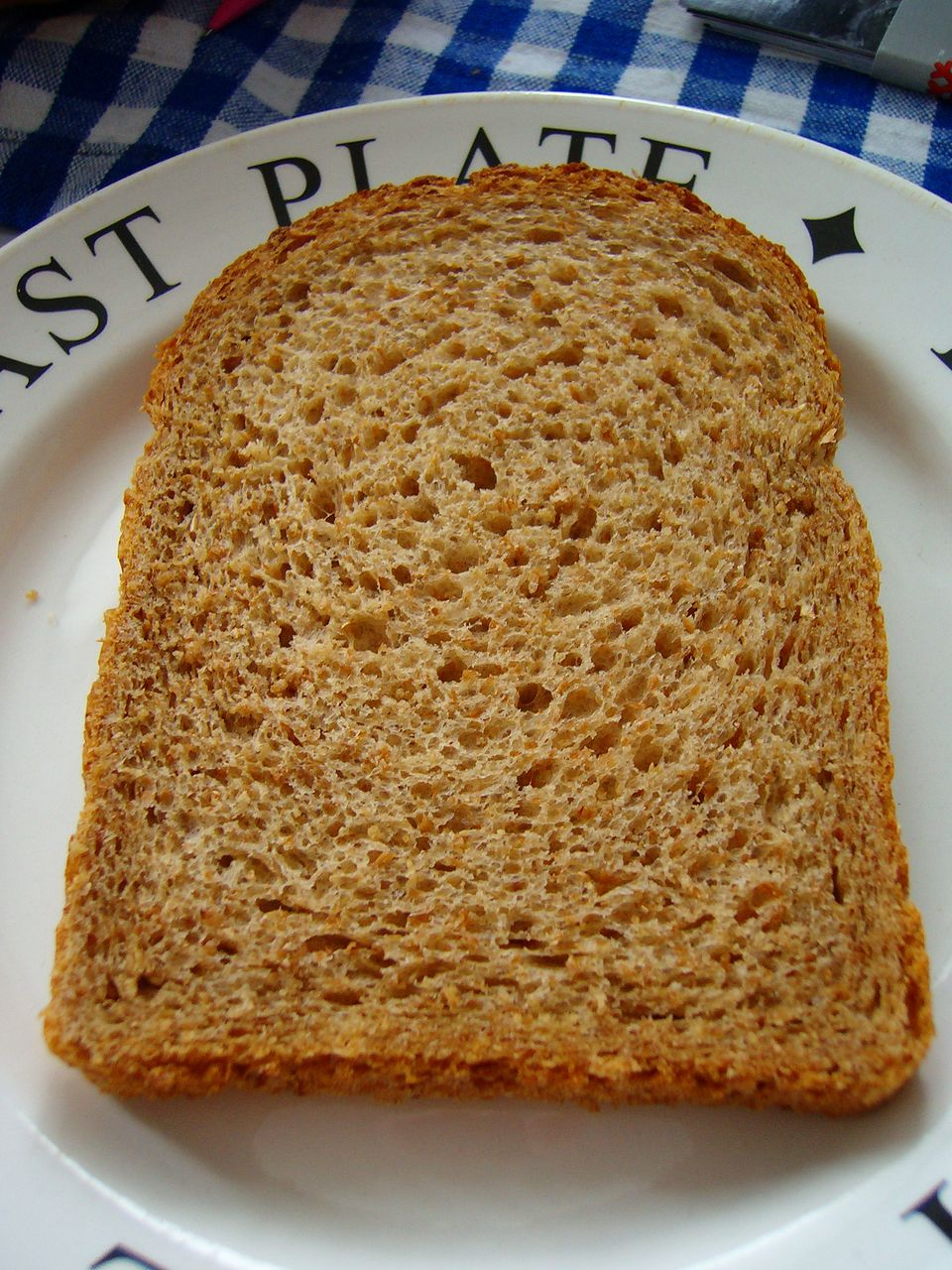 Boterham, fijn volkoren